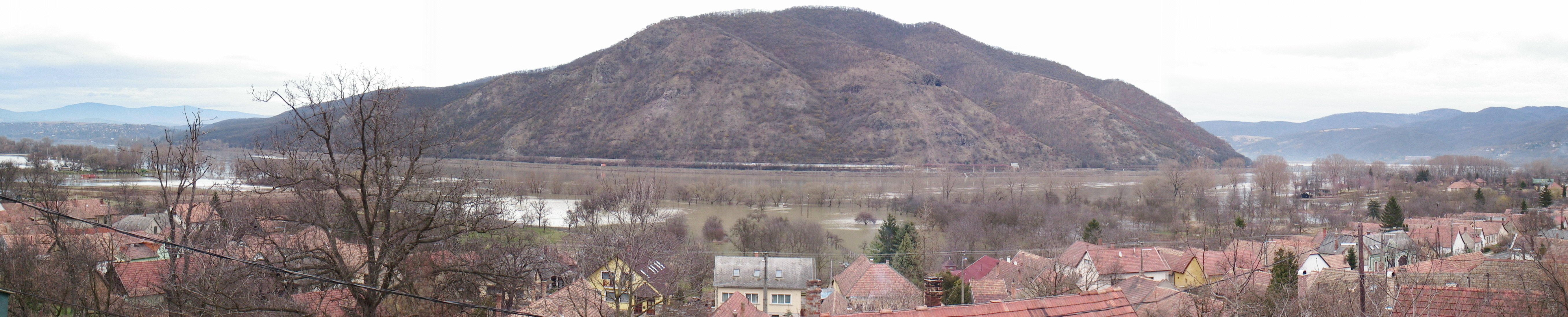 Dömös 2006. március 31.-én